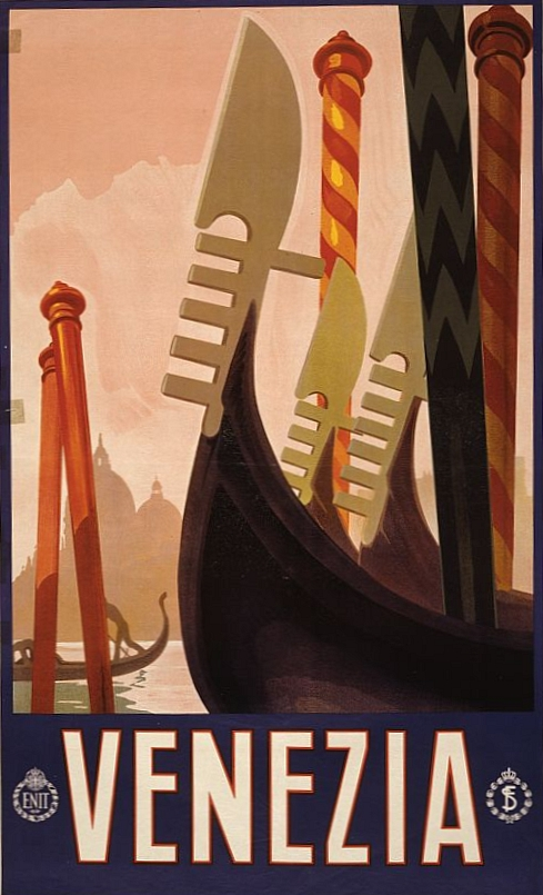 Venezia poster ca. 1920